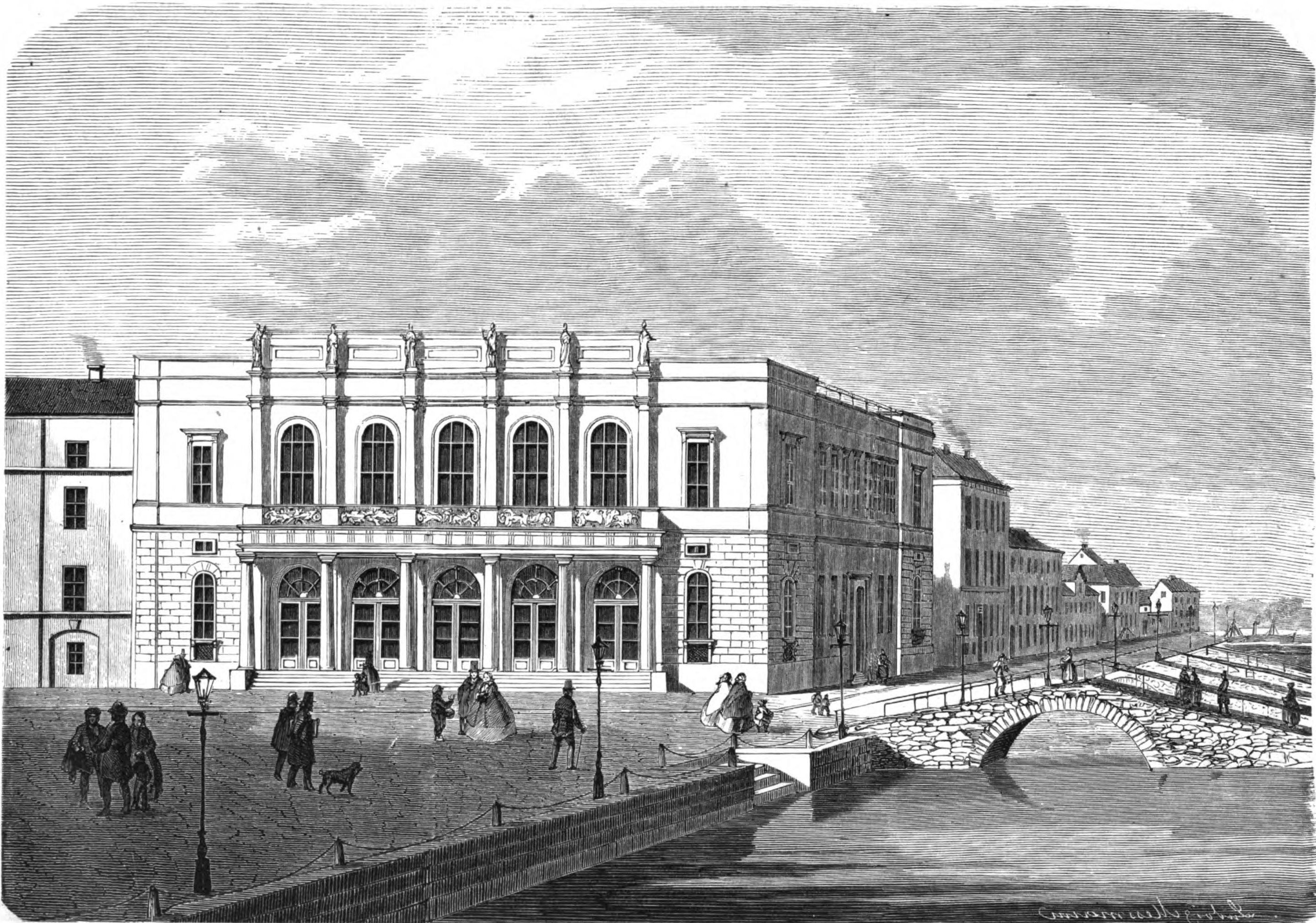 Börsen i Göteborg, från Nordiske Billeder, fjärde bandet. Köpenhamn 1870.